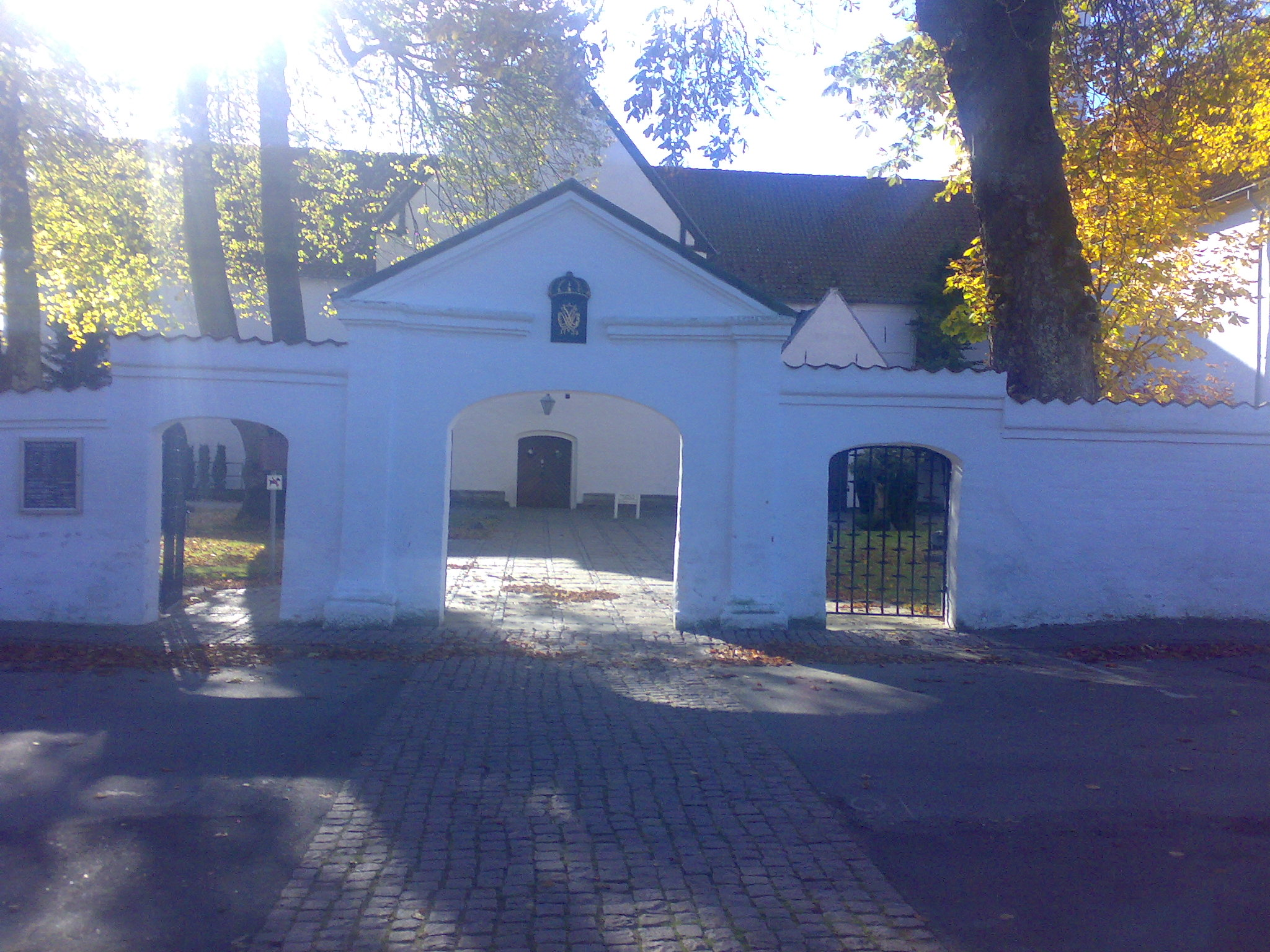 Indgangsparti ved Dronninglund kirke